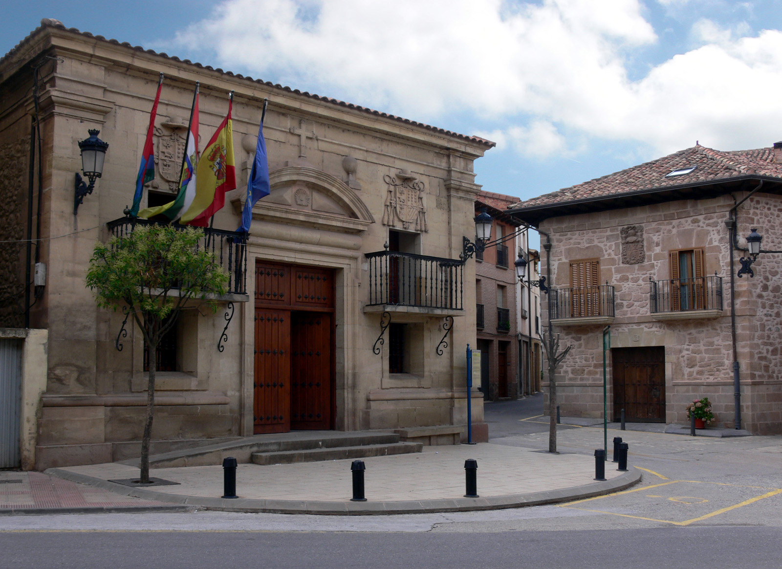 Ayuntamiento de Baños de Río Tobía, La Rioja - España.